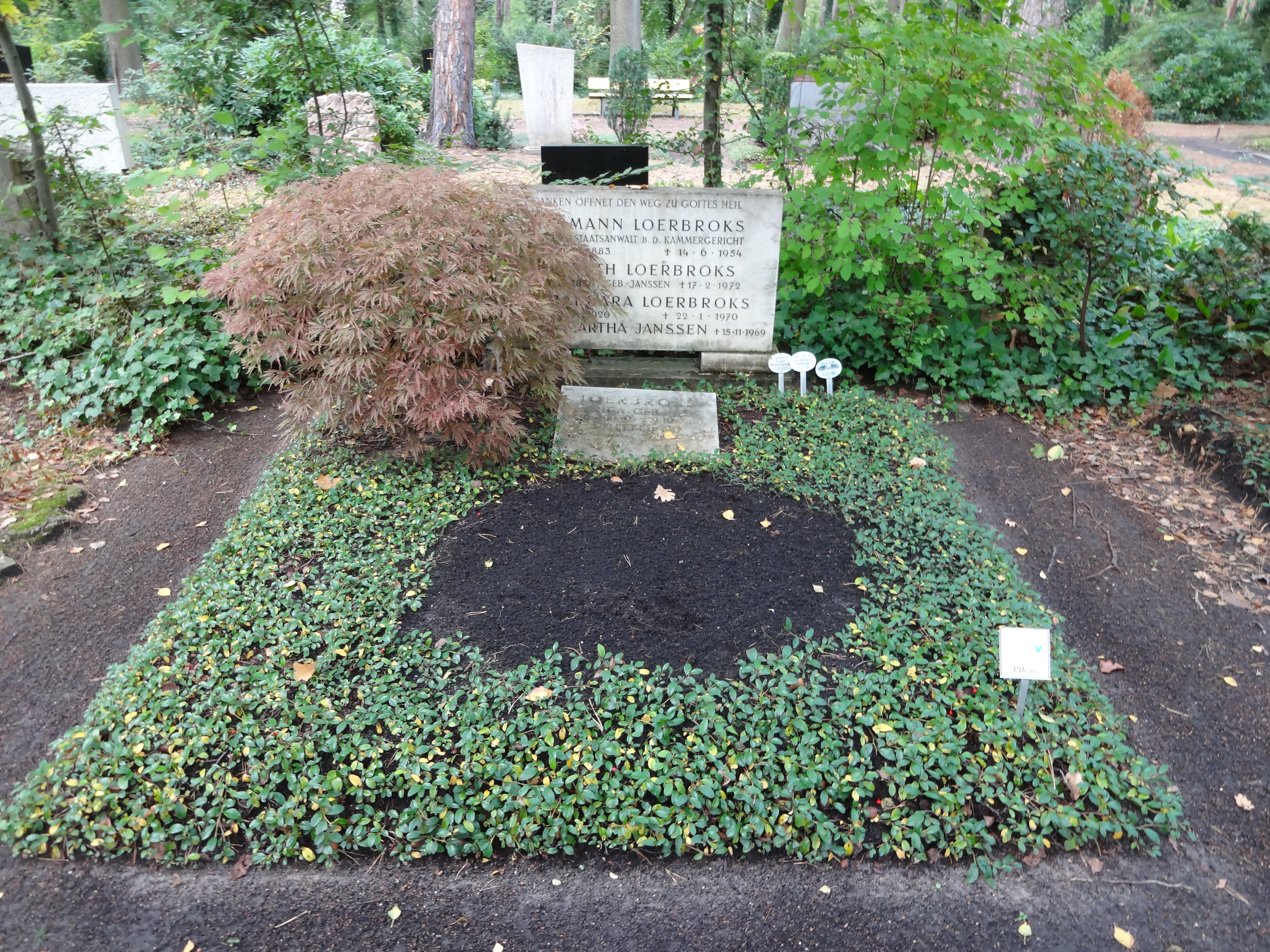 Grab von Hermann Loerbroks auf dem Waldfriedhof Zehlendorf